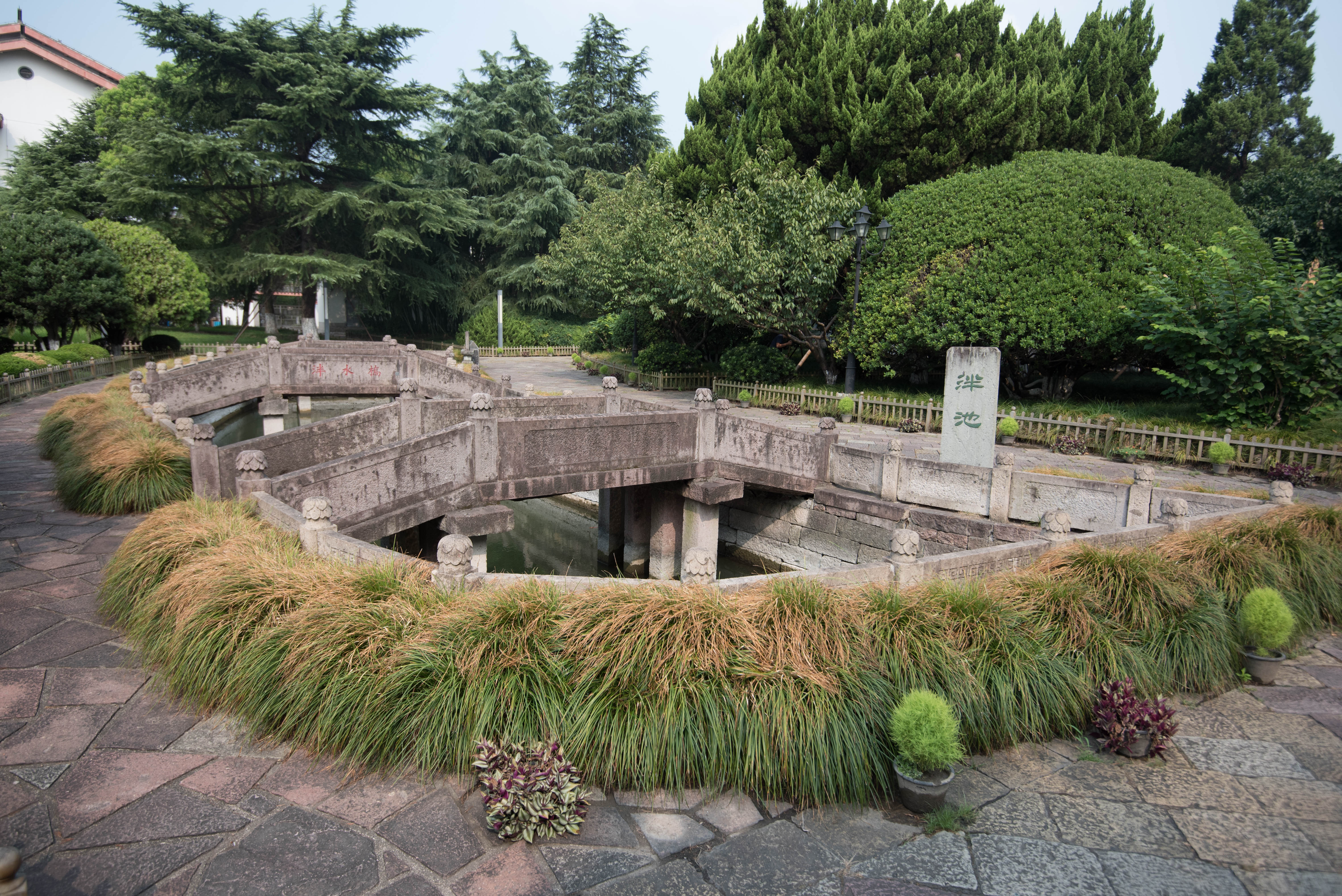 镇海学宫泮池